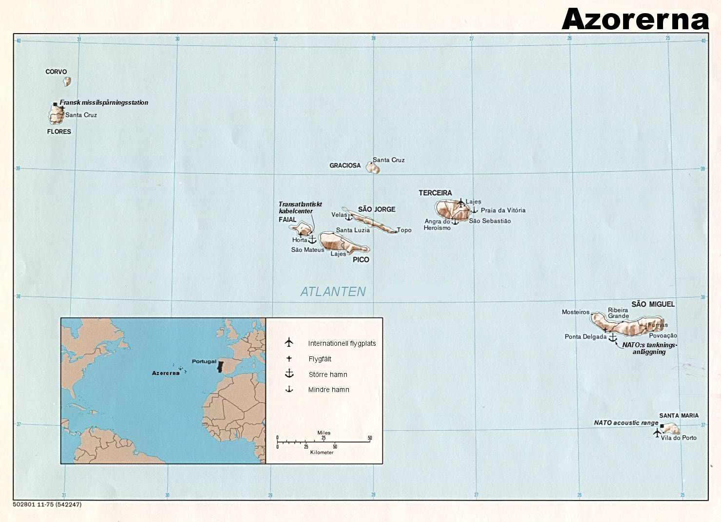 Svenskspråkig version av Image:Azores CIA.jpg